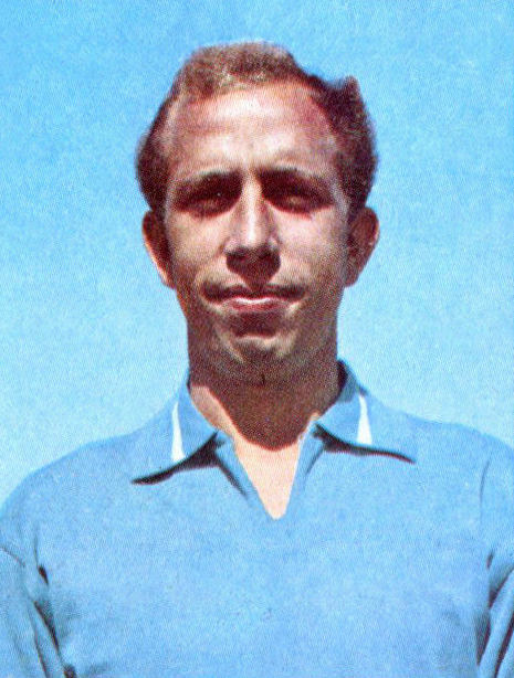 CAMPIONI DELLO SPORT 1966/67 - Figurina/Sticker n. 129 - OTTAVIO BIANCHI -Rec